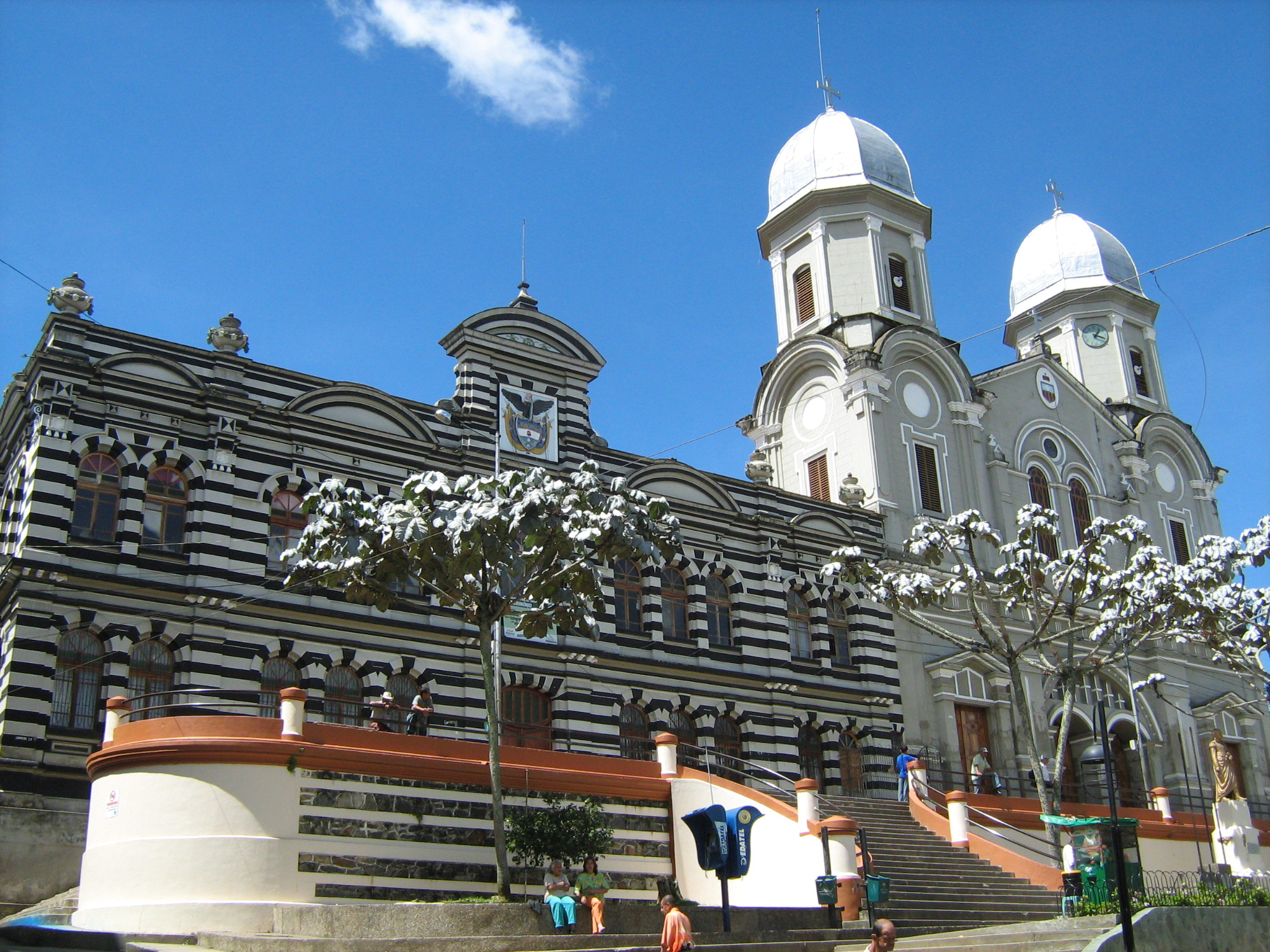 Escuela Rosenda Torres y Basílica Menor de Nuestra Señora de la Merced, en el Municipio de Yarumal, Antioquia. Colombia.